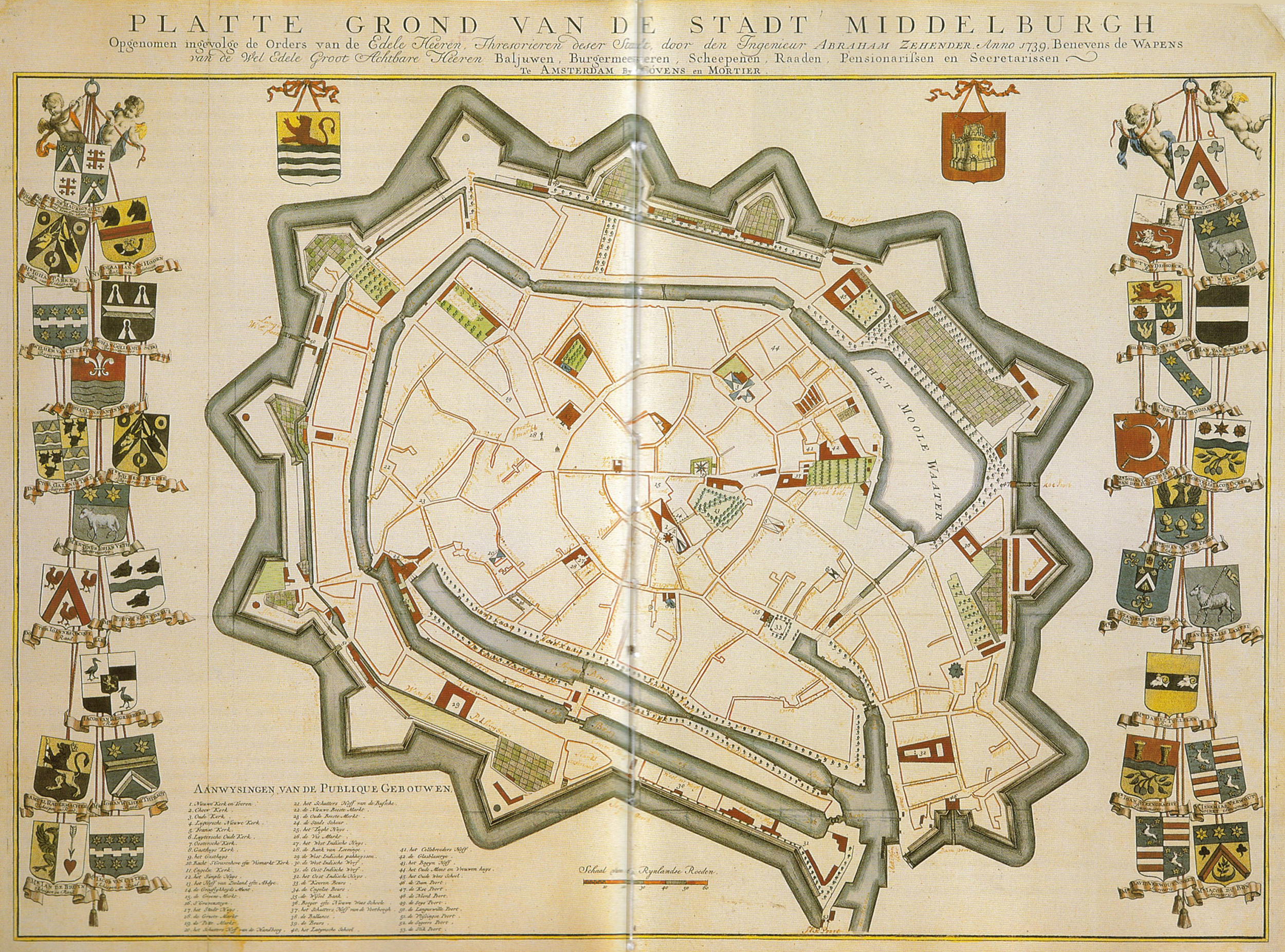 Platte Grond van de Stadt Middelburgh van Covens_en_Mortier